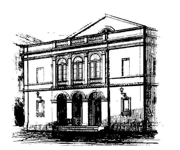 Théâtre de Périgueux en 1848, construit par Louis Catoire, place Mouchy (place du général de Gaulle), détruit en 1956 - Annales agricoles et littéraires de la Dordogne, 1848, tome IX